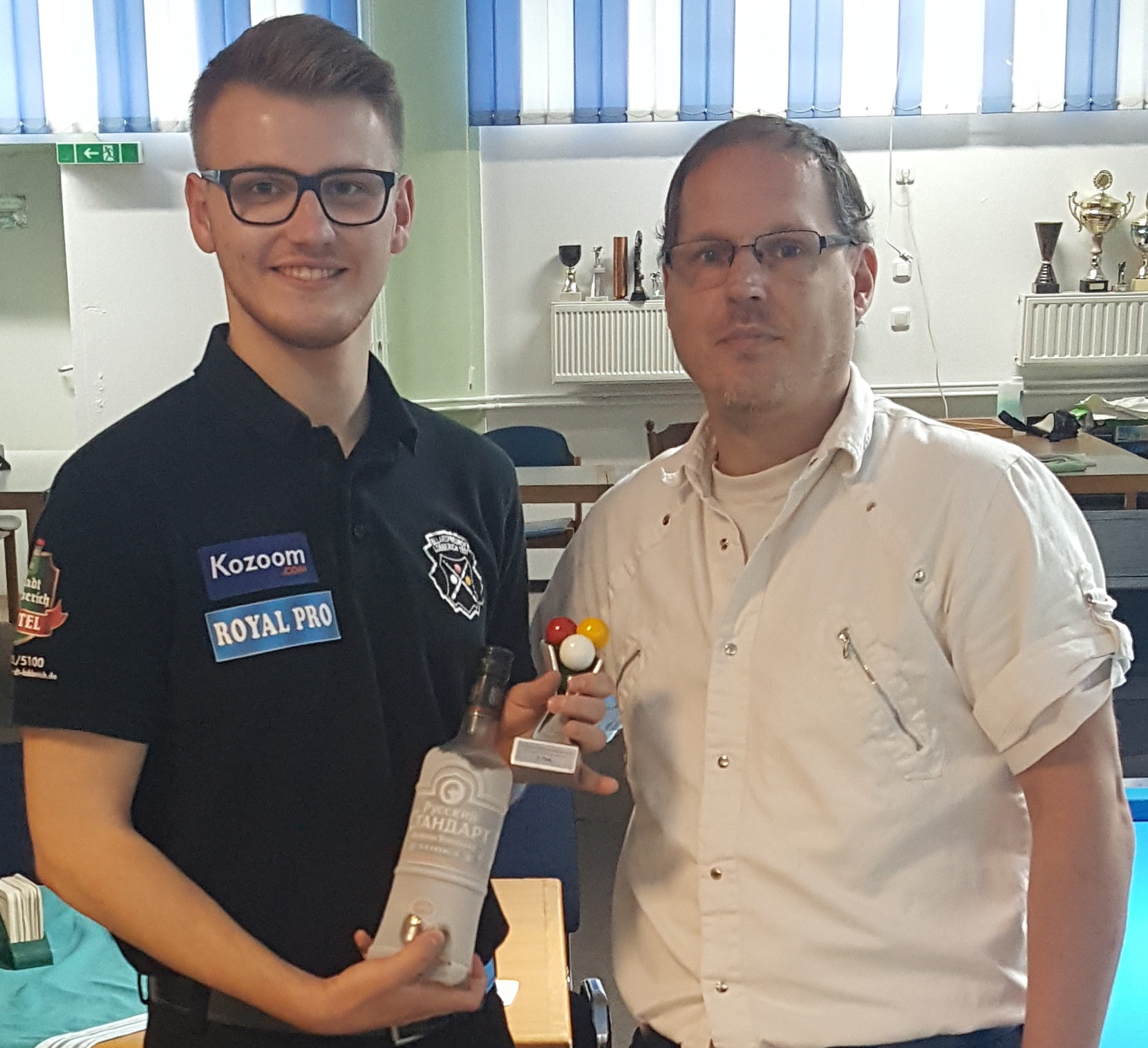 siehe Dateiname